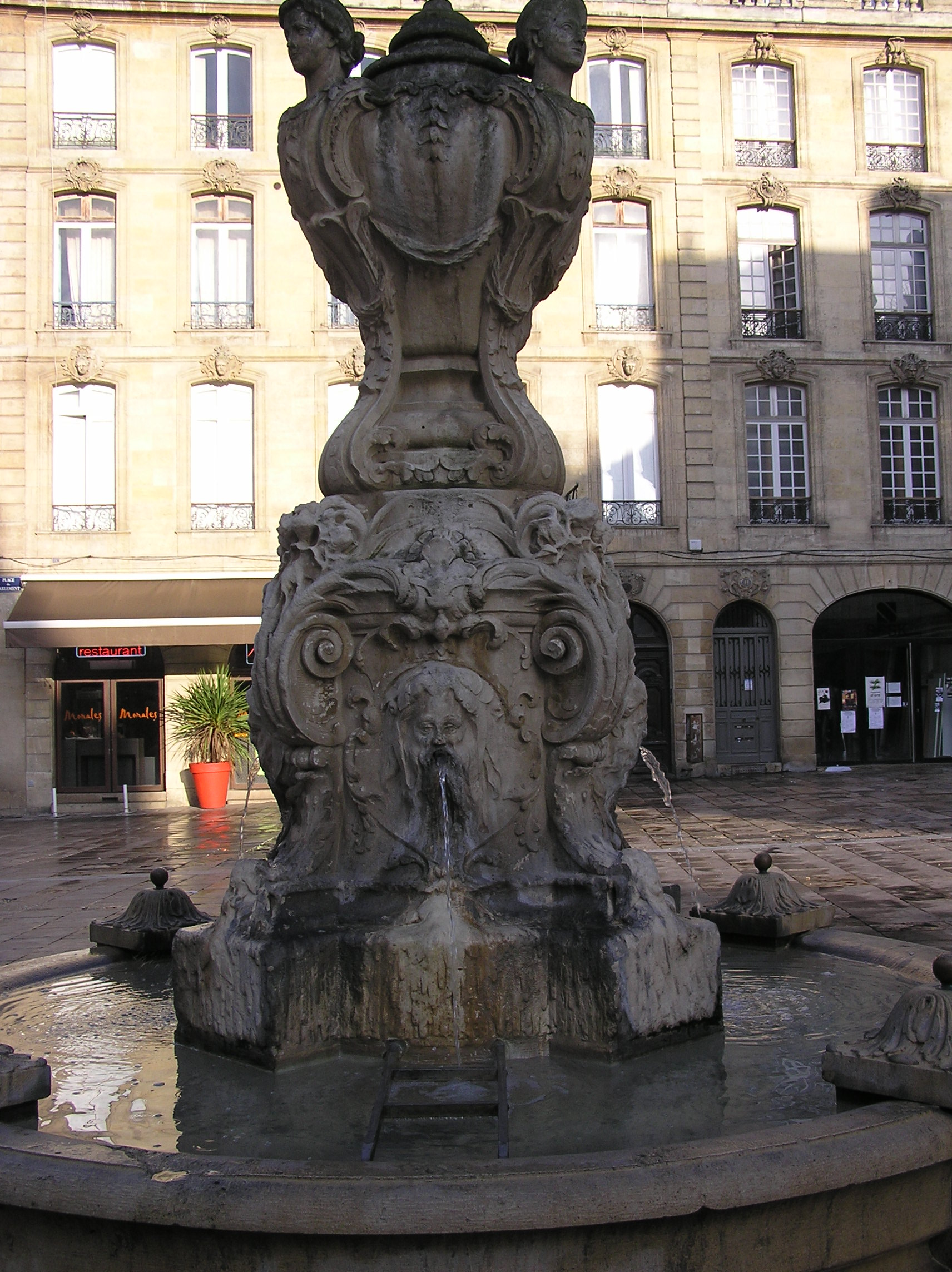 Bordeaux place du parlement, la fontaine de la place